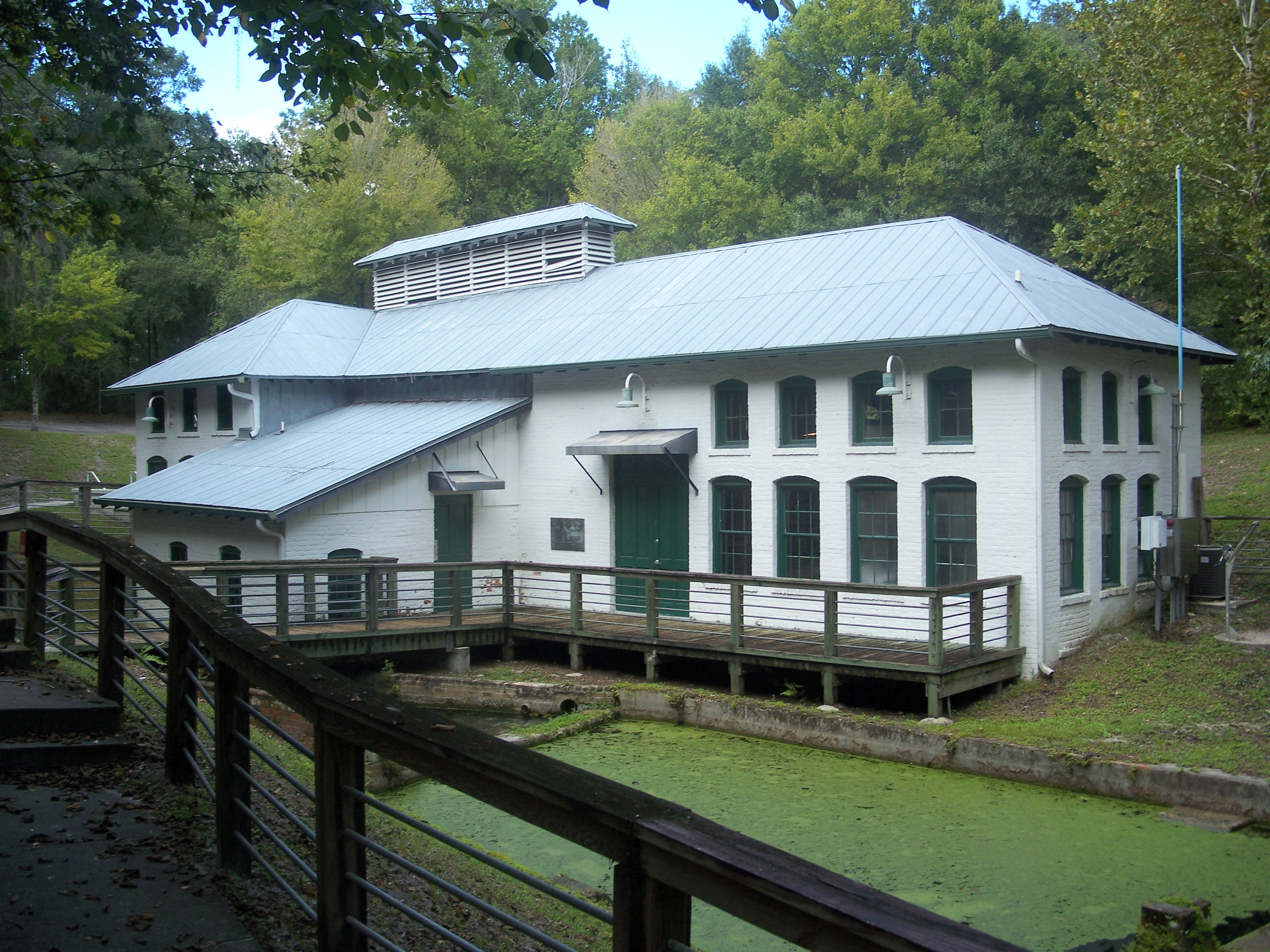 Old water works building.